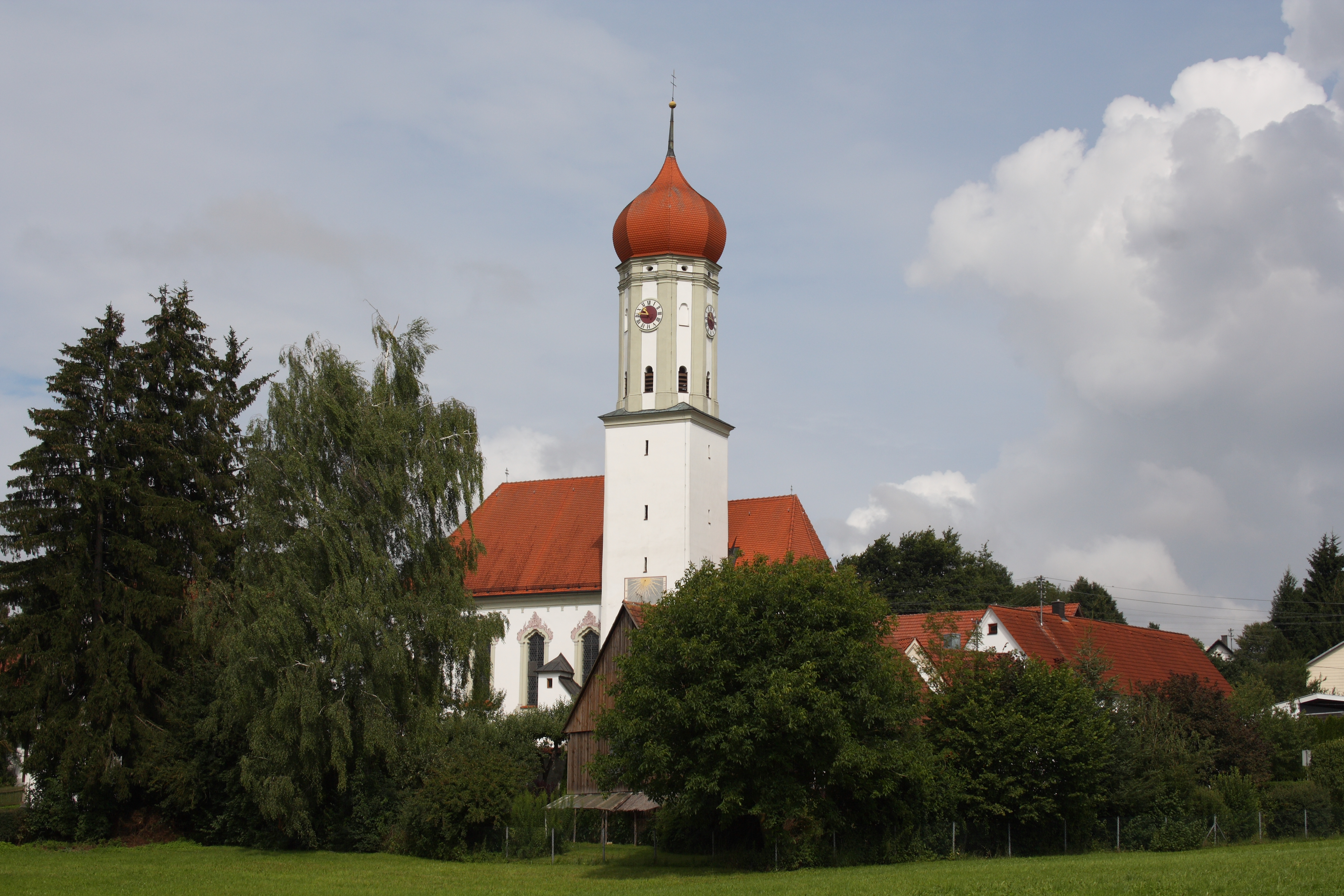 Katholische Pfarr- und Wallfahrtskirche Mariä Schmerzen in Waldkirch, einem Ortsteil von Winterbach (Schwaben), 1745 von Joseph Dossenberger (1721-1785) errichtet